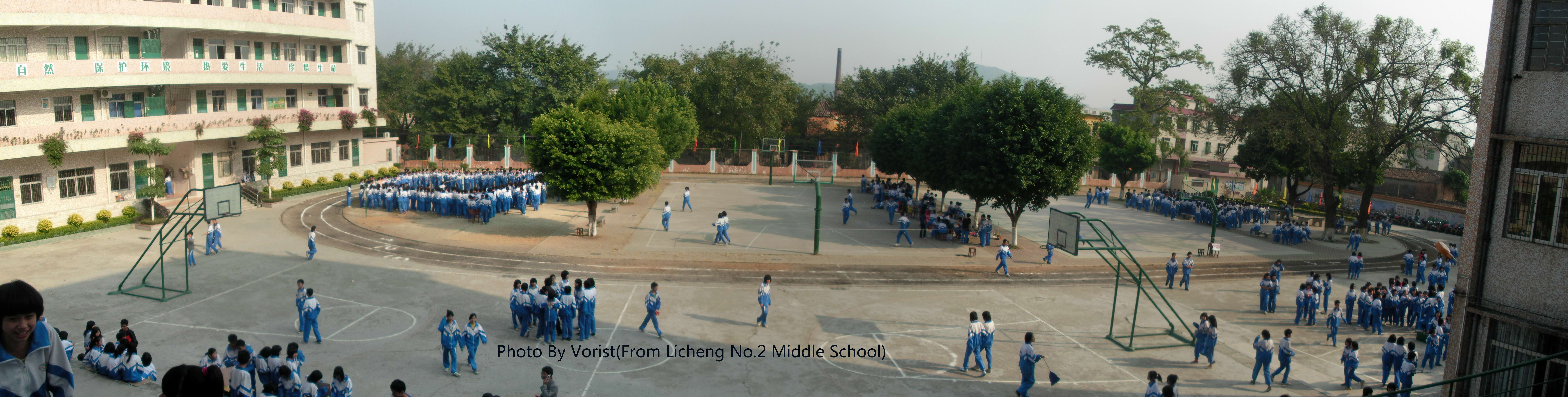 荔城二中校内